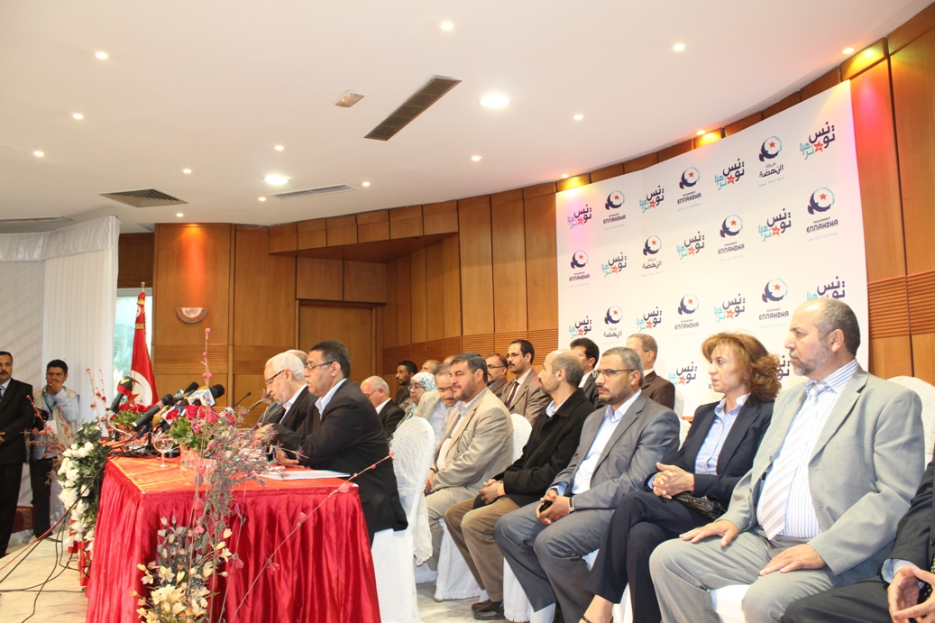 Membres de la direction du parti tunisien Ennahda